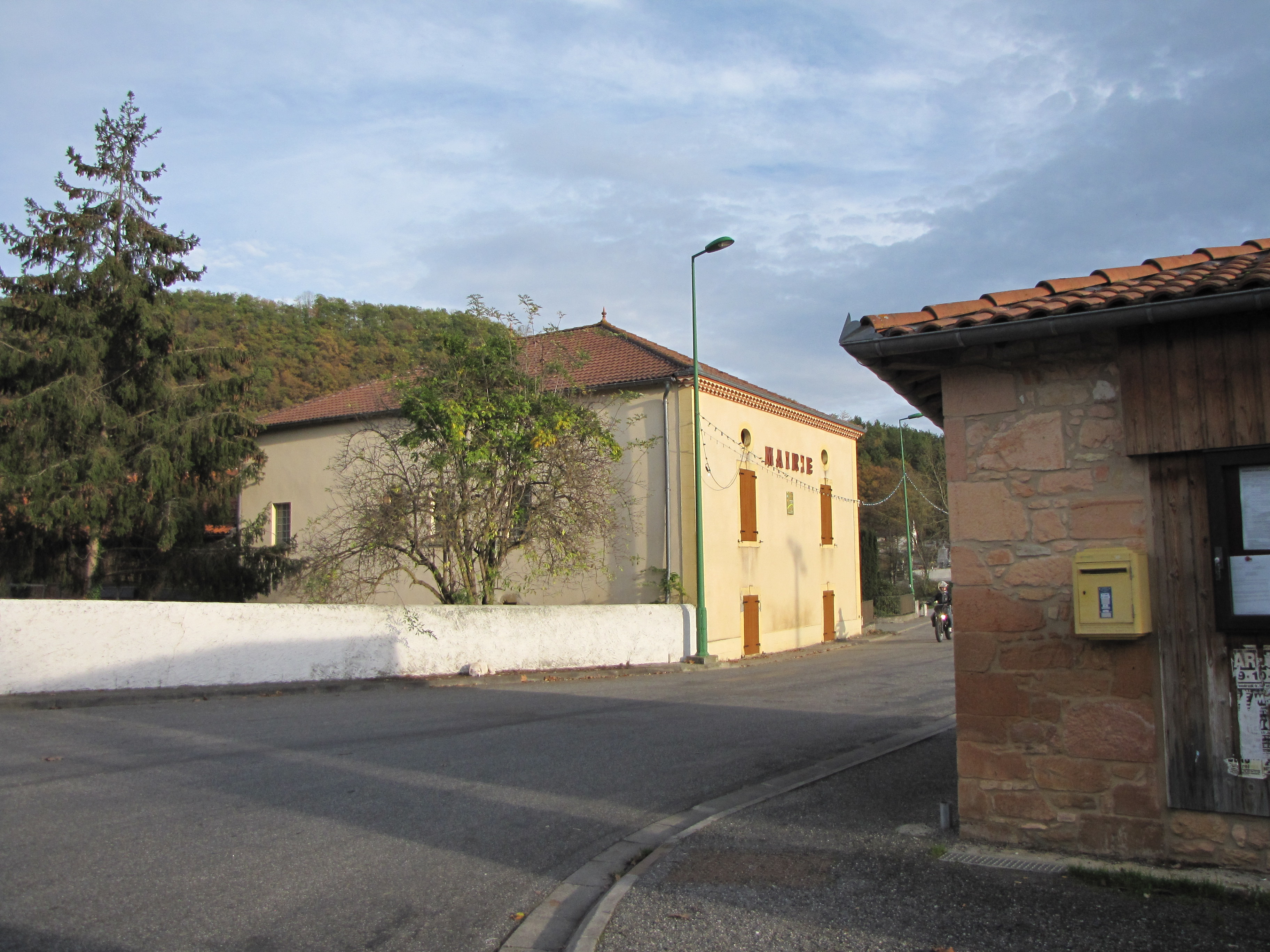 Mairie de Saint-Marcet